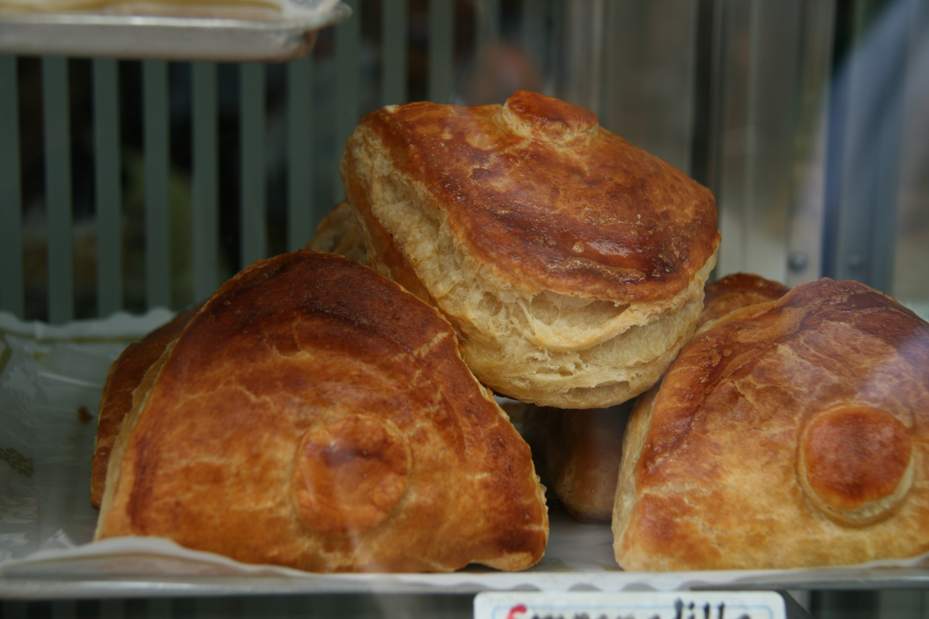 Empanadas de Atún (Hojaldre) - La Mallorquina (Madrid)